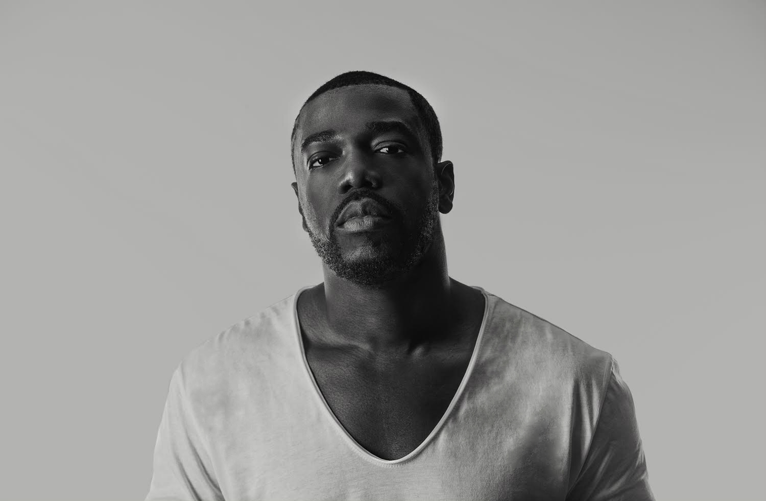 James BKS